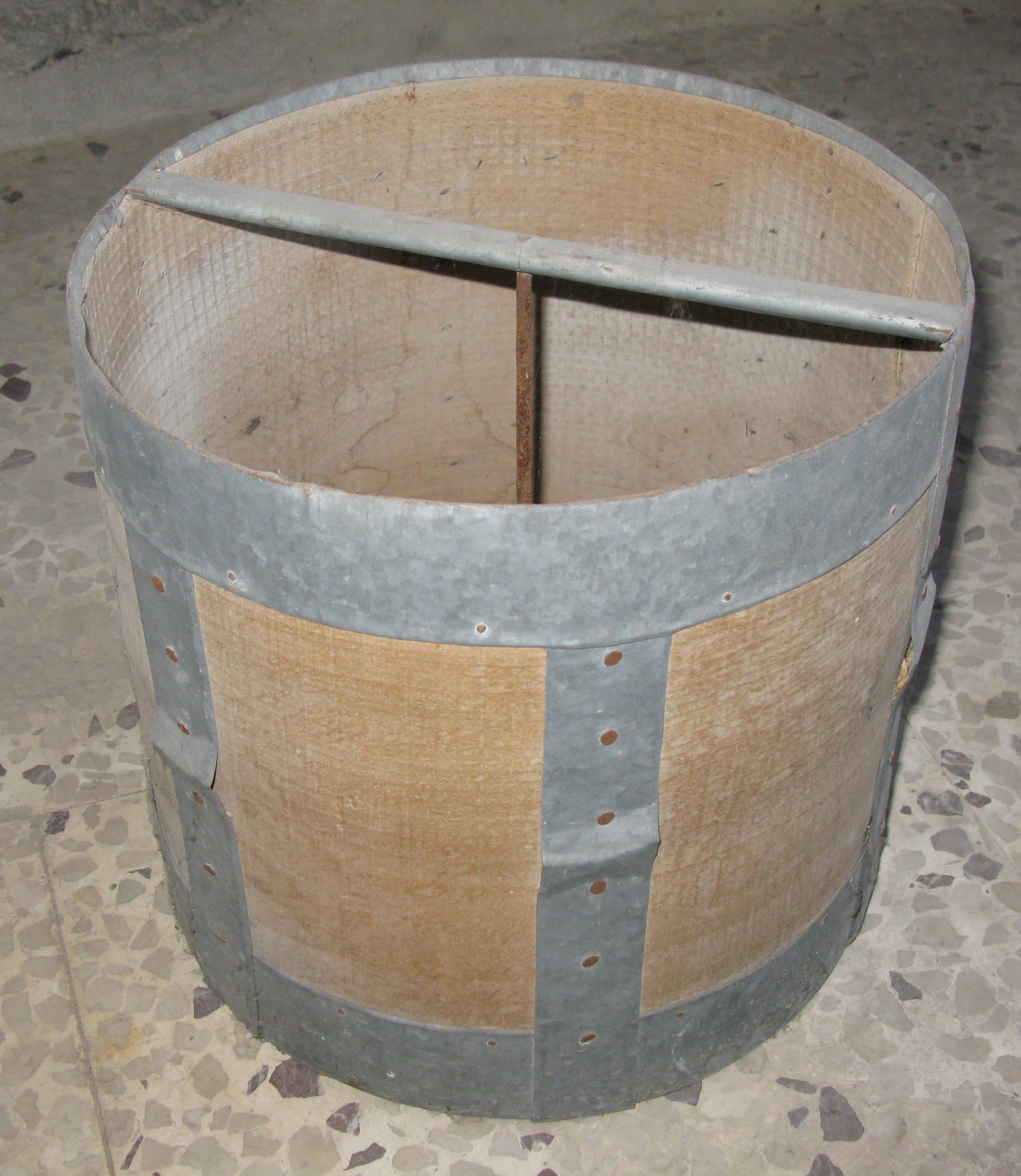 Tùmminu